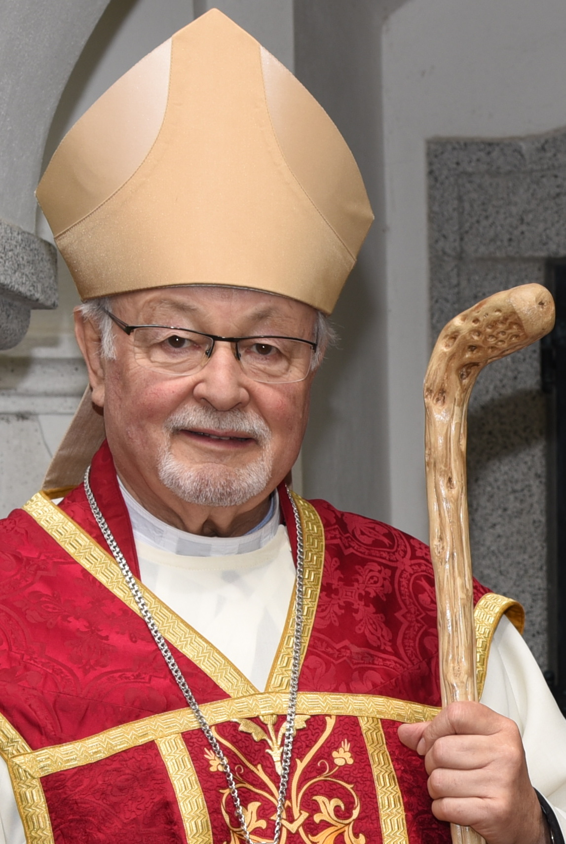 Wilhelm Neuwirth spendet die heilige Firmung in der Pfarre St. Gotthard am 13. Mai 2017